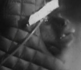 El mono Juan (mono) (1969) pocos minutos después de regresar del espacio.